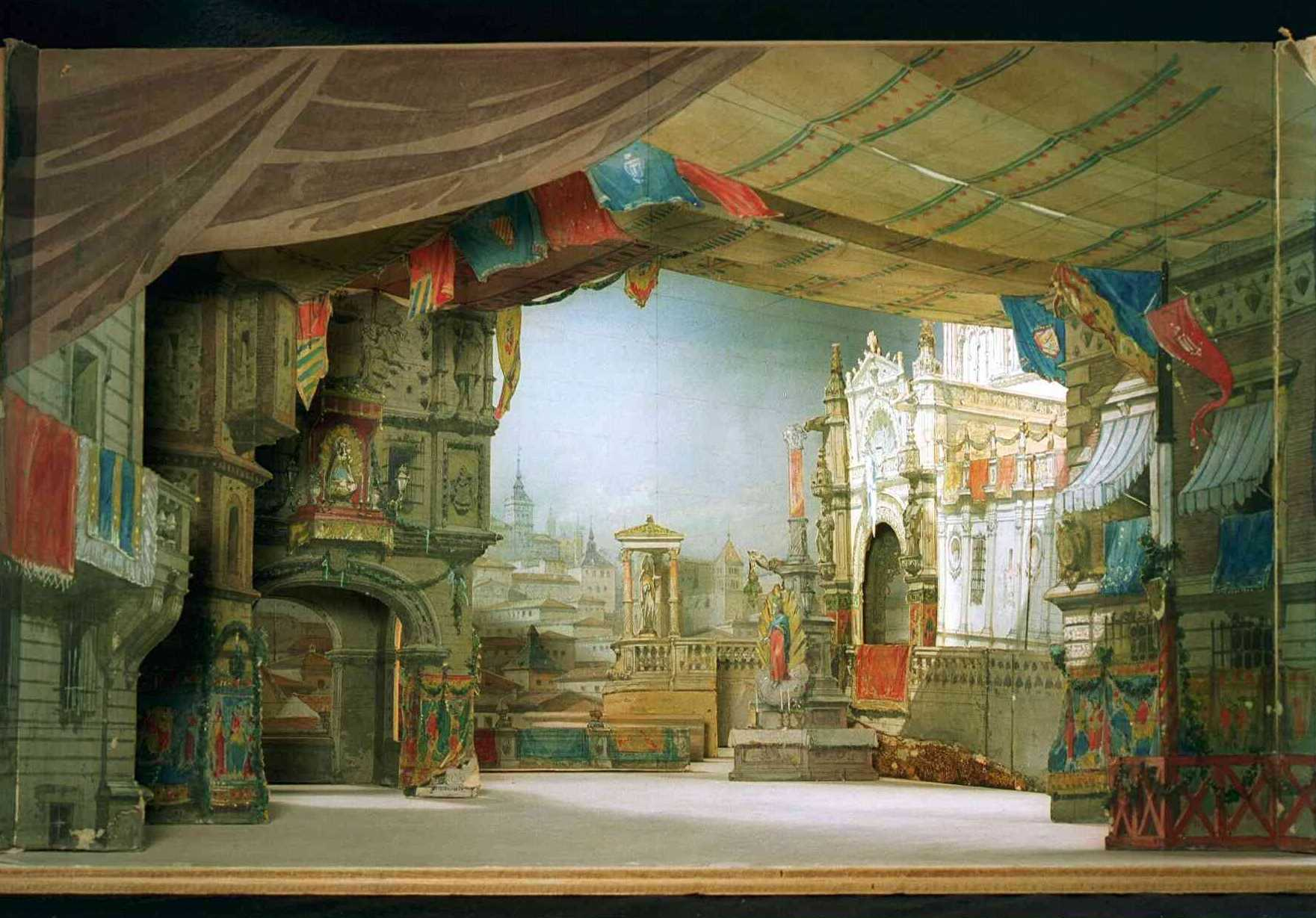 Escenografia de Francesc Soler i Rovirosa per a l'òpera Don Carlo de Giuseppe Verdi al Gran Teatre del Liceu l'any 1870